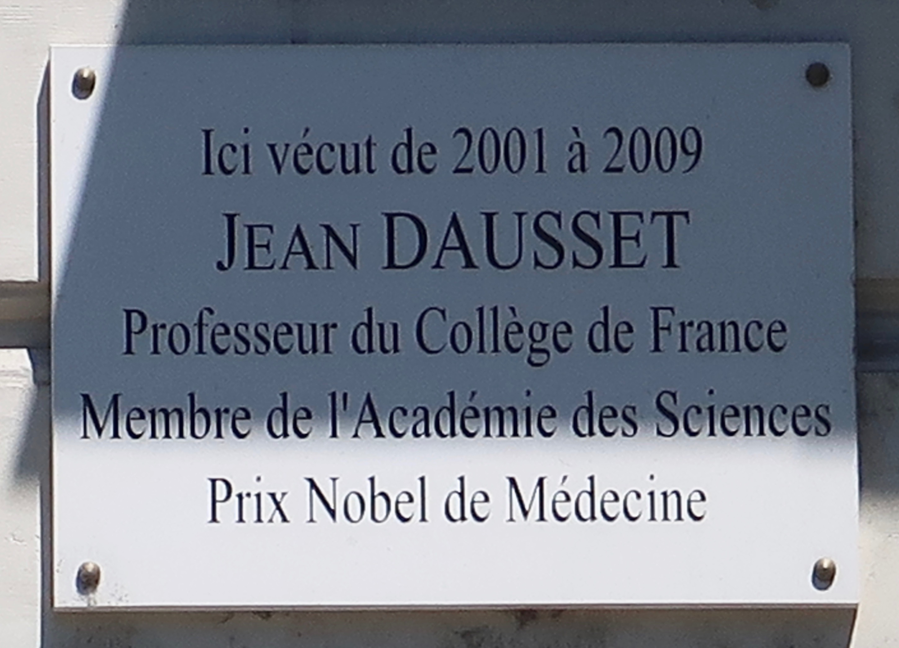 Plaque en hommage au médecin Jean Dausset, 44 rue des Écoles (Paris, 5e).